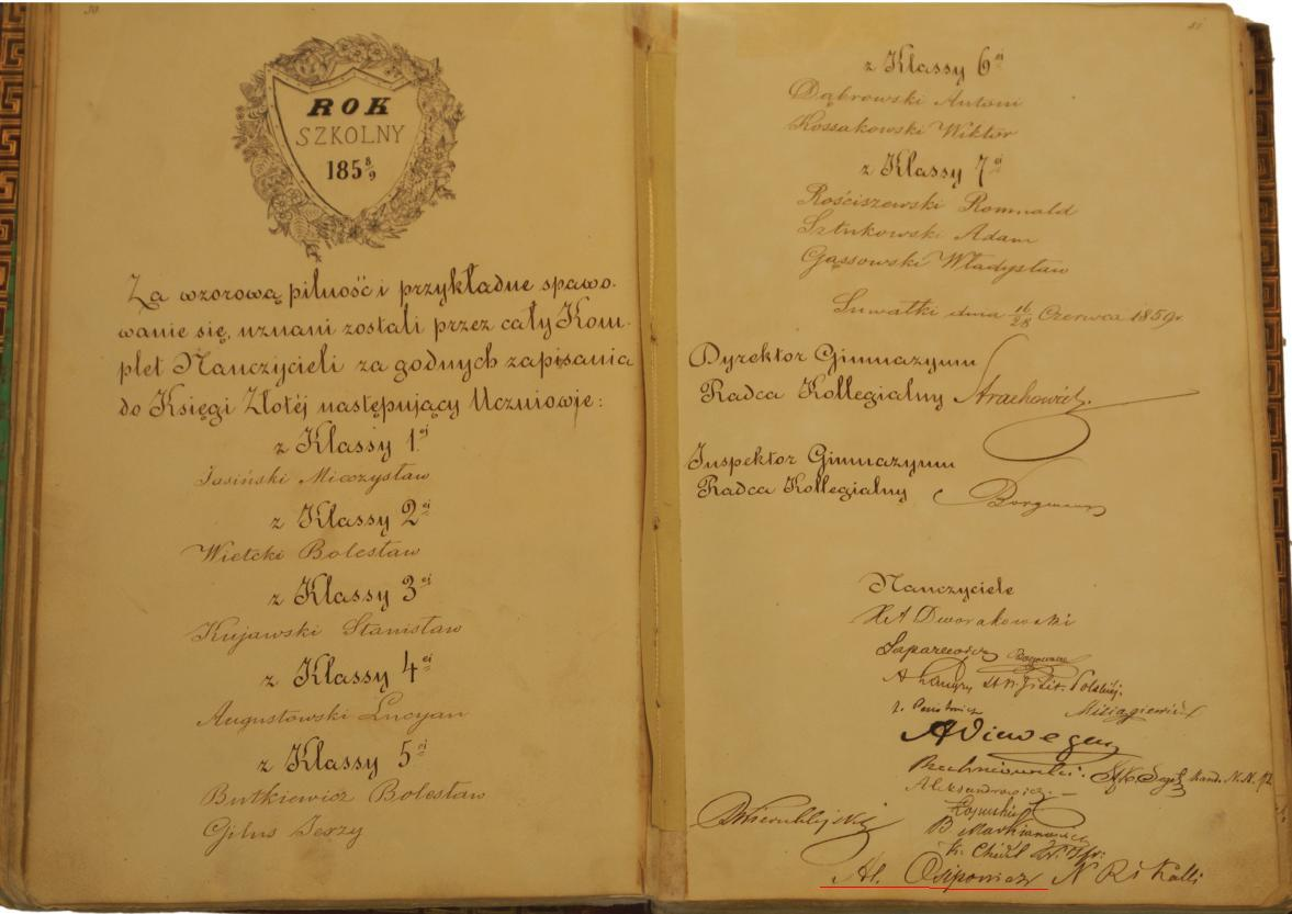 "Złota Księga" Liceum Ogólnokształcącego im. Marii Konopnickiej została zdigitalizowana i wydana razem z monografią pt. "I Liceum Ogólnokształcące im. Marii Konopnickiej w Suwałkach w latach 1944-2016", pod red. Alicji Kozłowskiej, Andrzeja Matusiewicza, Suwałki 2016 +CD.